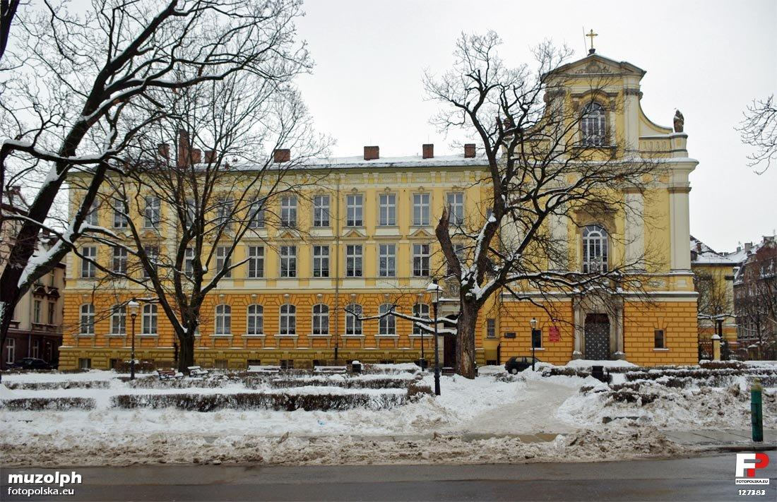 Legnica, Plac Klasztorny 7 - I Liceum Ogólnokształcące im. Tadeusza Kościuszki (dawny kościół klasztorny Benedyktynek p.w. św. Maurycego, obecnie aula i sala gimnastyczna)